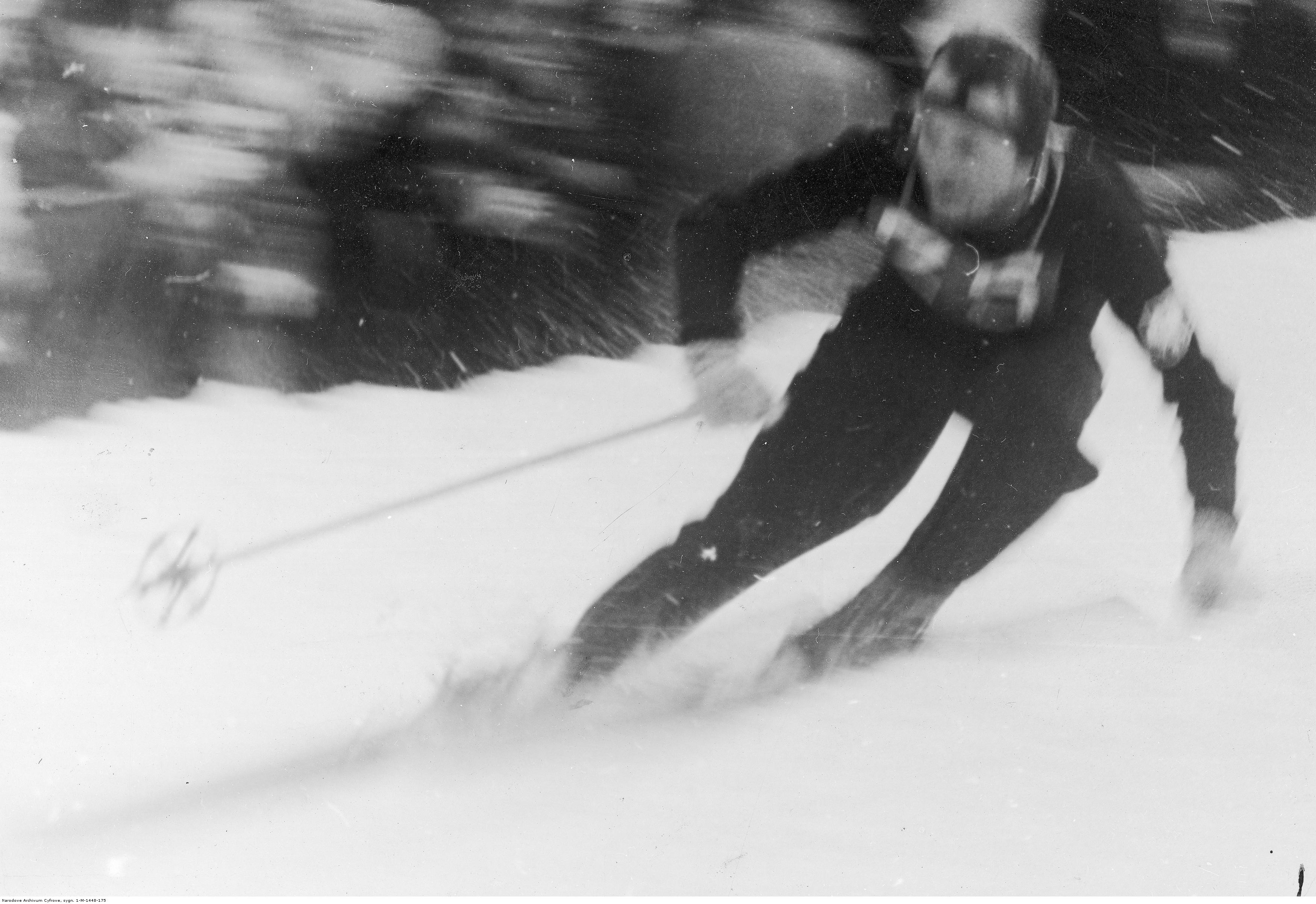 Mistrzostwa Świata w Narciarstwie Klasycznym FIS w Zakopanem. Narciarz Bronisław Czech podczas jazdy slalomem. 1939-02-11 - 1939-02-19 (Koncern Ilustrowany Kurier Codzienny - Archiwum Ilustracji)